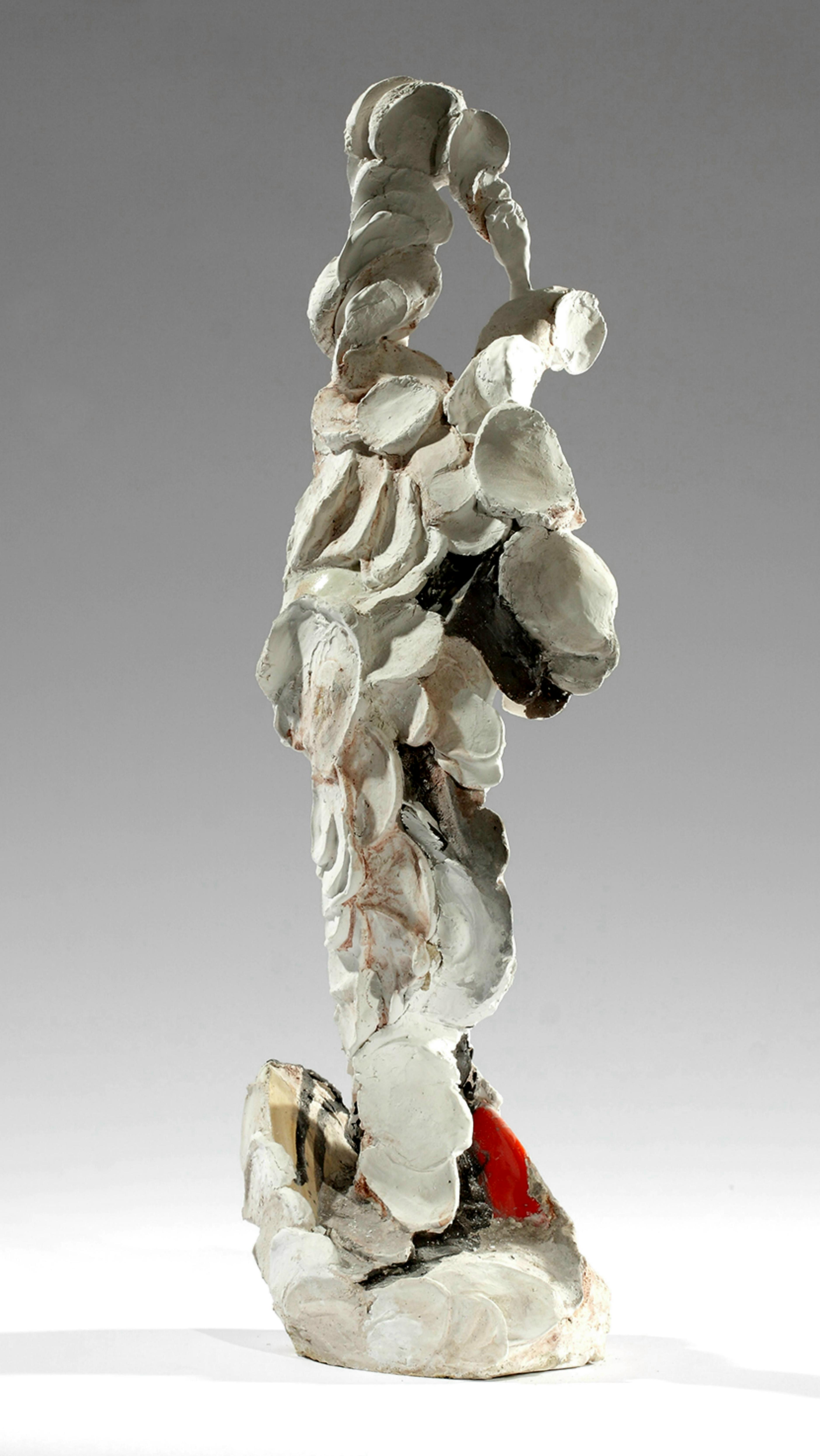 Federwolke (Eva Backofen)